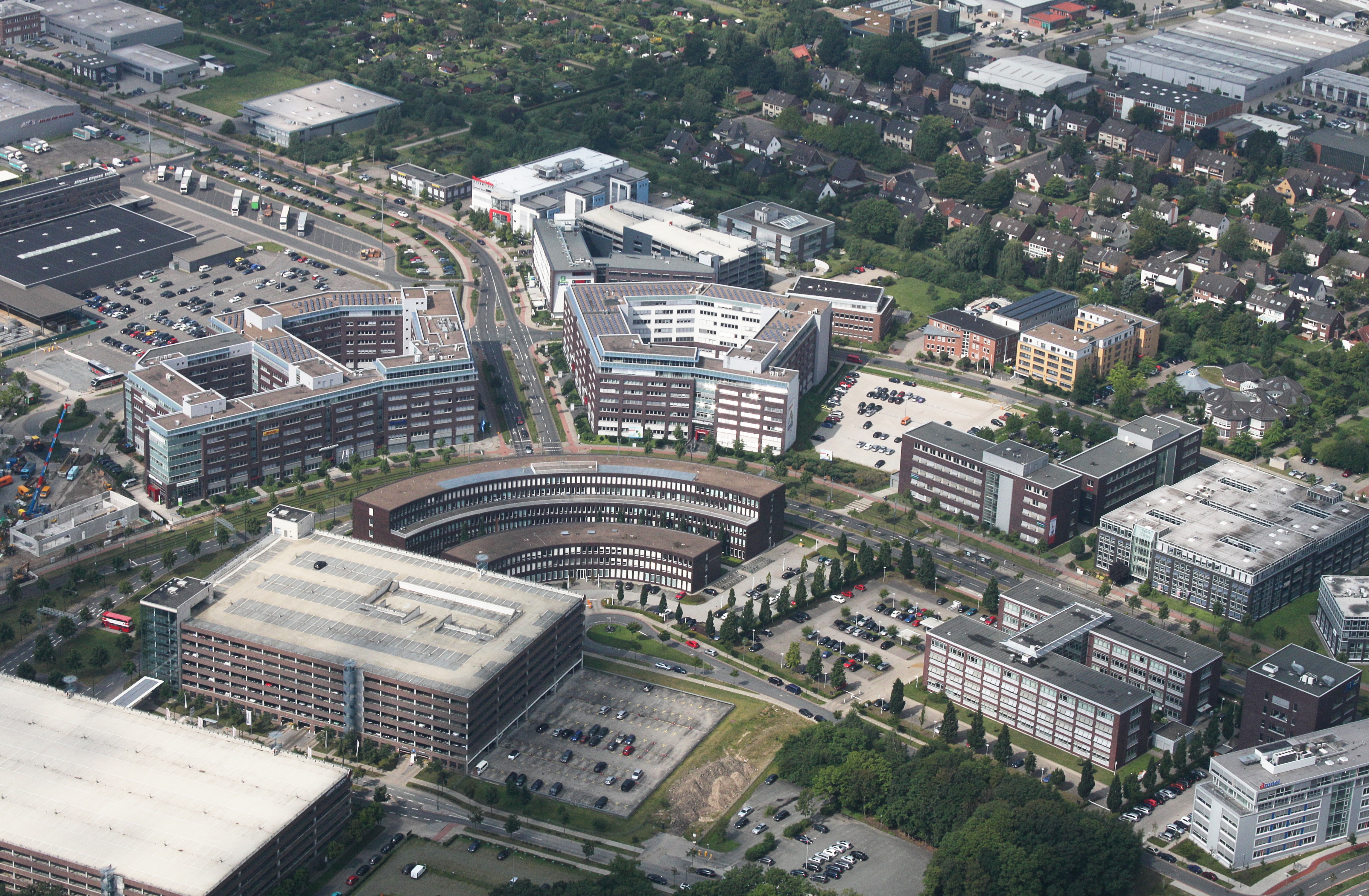 Flughafen Bremen; Bremen; Stadtteil: Neustadt Bremen; Ortsteil Neuenland; Airportstadt